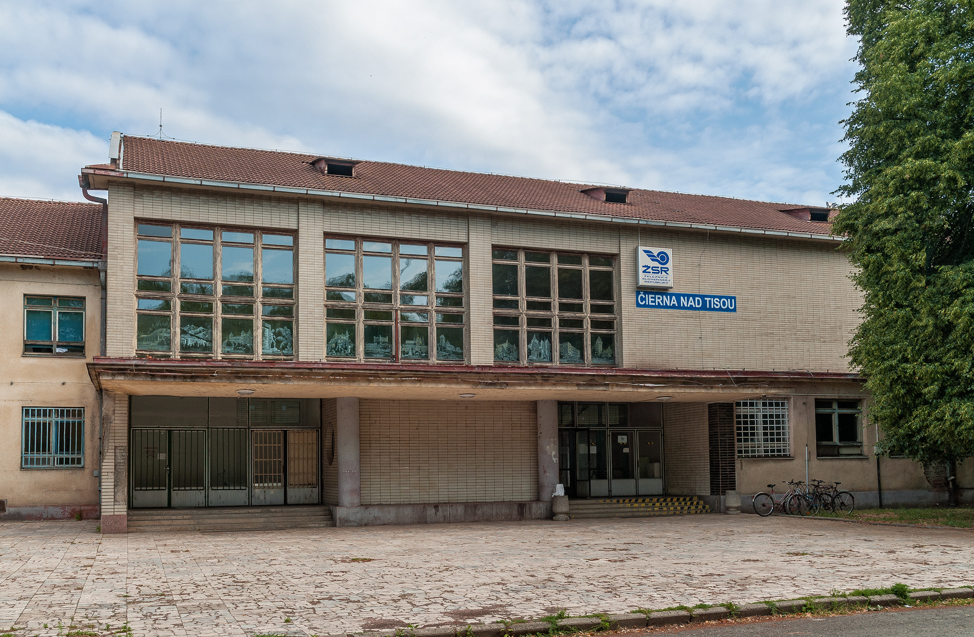 Budova železniční stanice Čierna nad Tisou, pohled z Železničnej ulice.